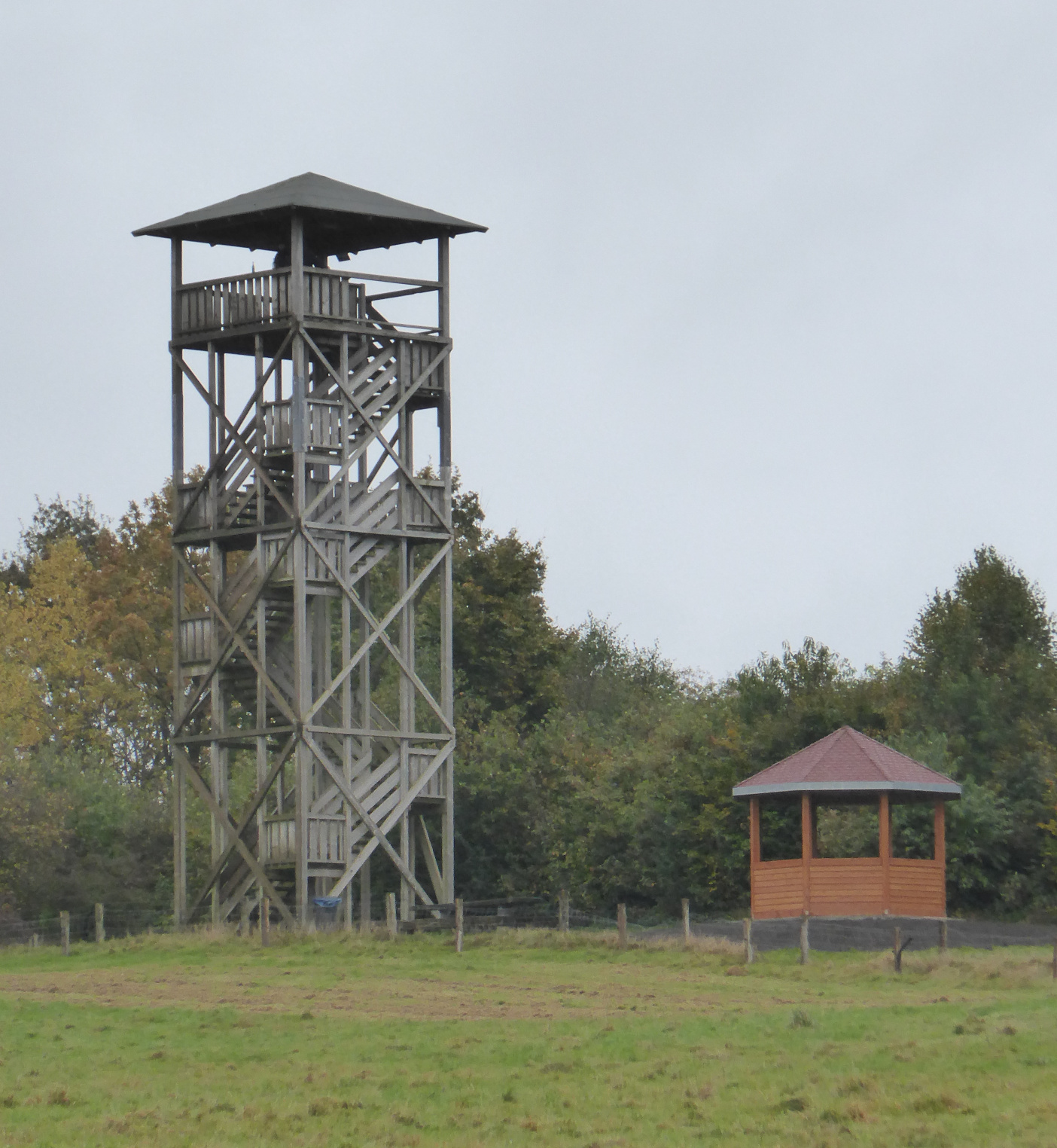 Aussichtsturm Ketelvierth in der Gemeinde D-24623 Großenaspe